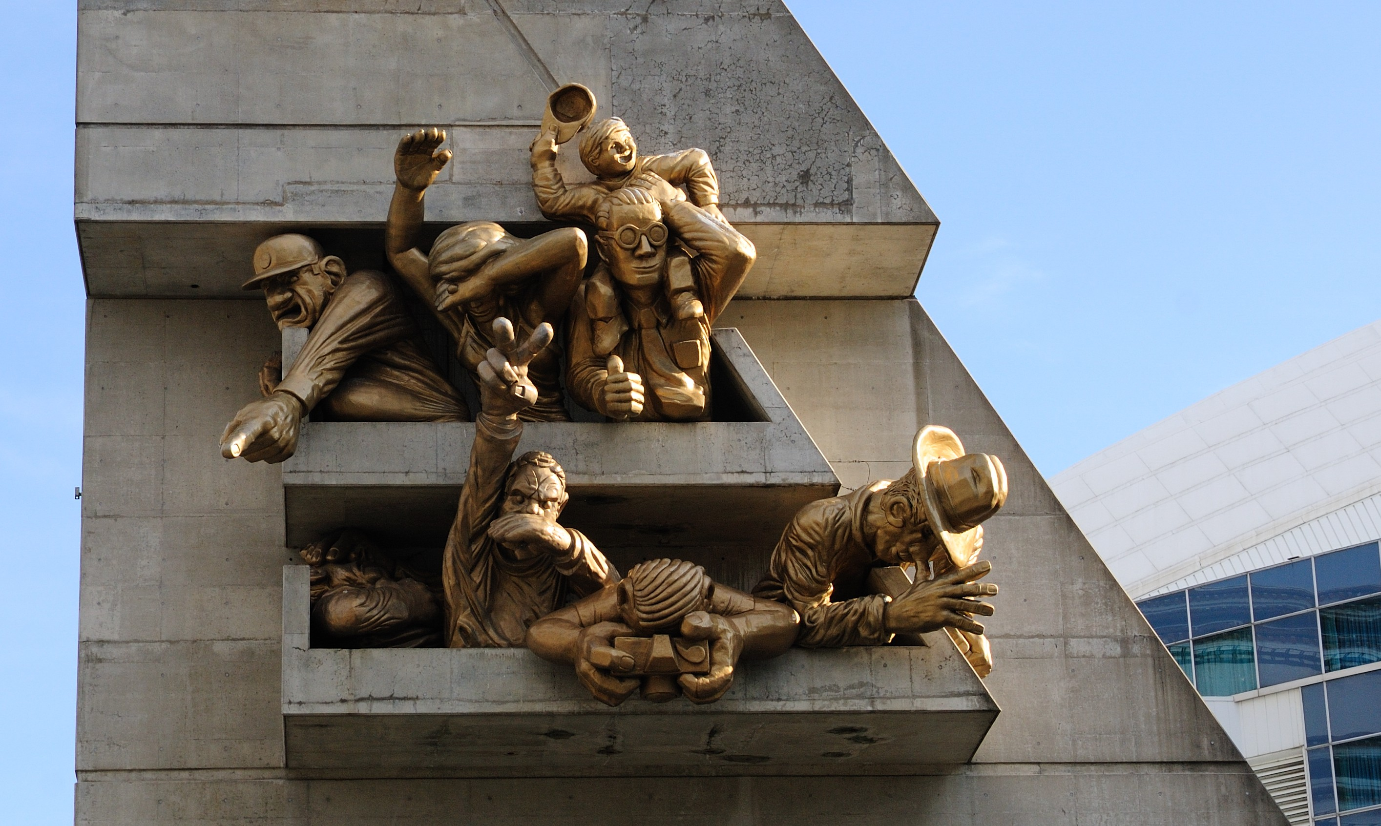 Toronto: Skulptur The Audiance von Michael Snow am Rogers Centre